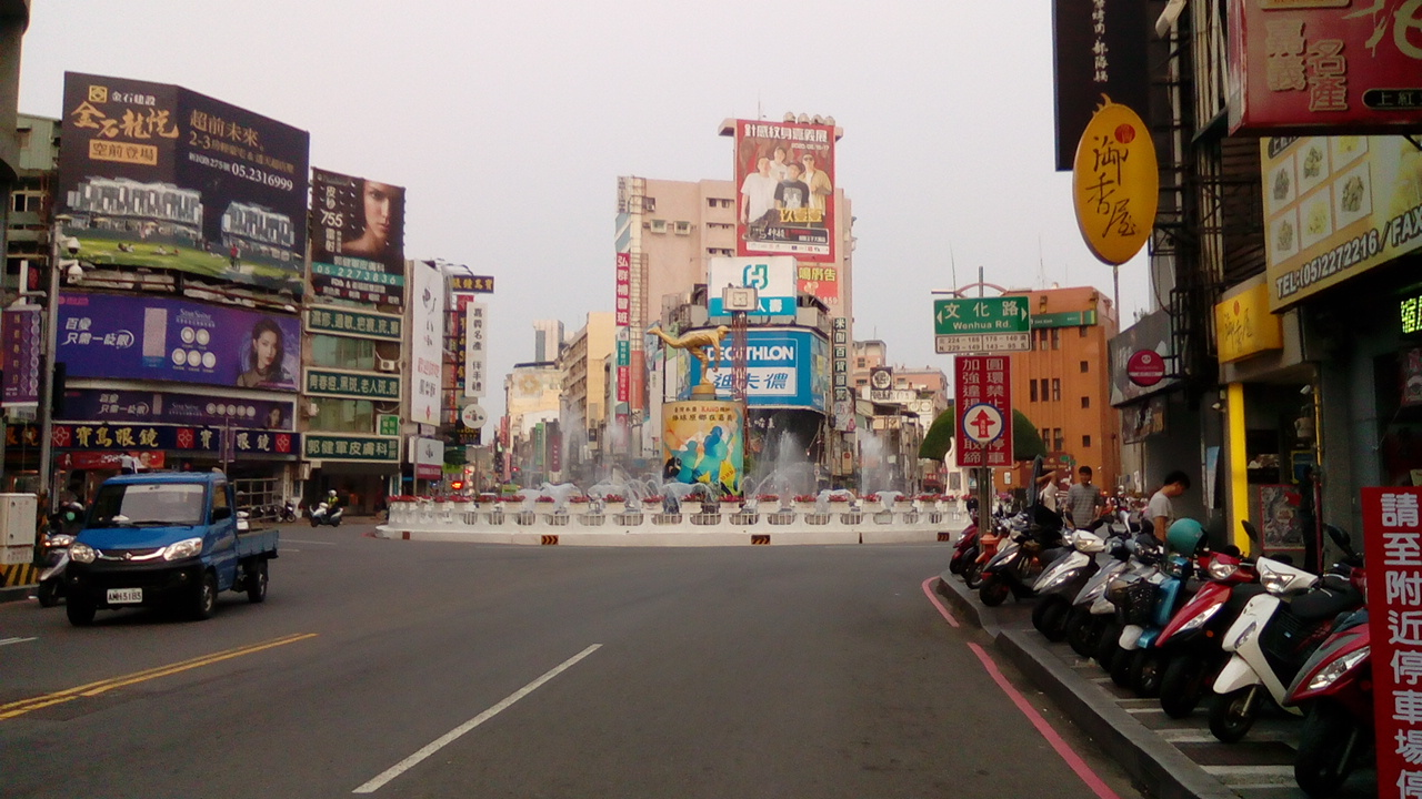 又稱中央噴水池 位於中山路 文化路 光華路 公明路口 為嘉義市的傳統地標 亦為商業中心